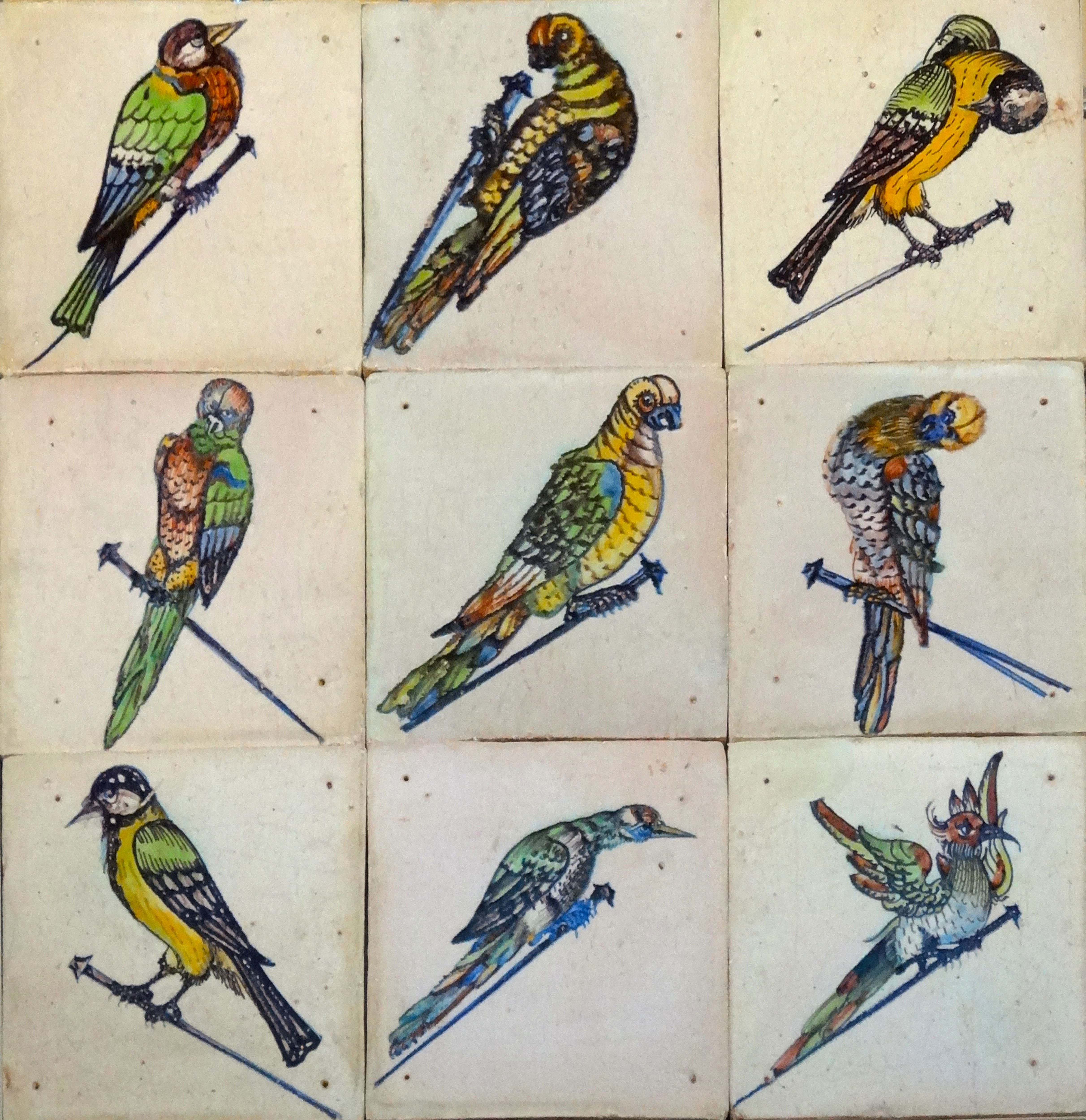 spijkertegels afkomstig uit de plateelbakkerij "De Swaen" te Gouda, behoort tot de collectie van het Museum Gouda